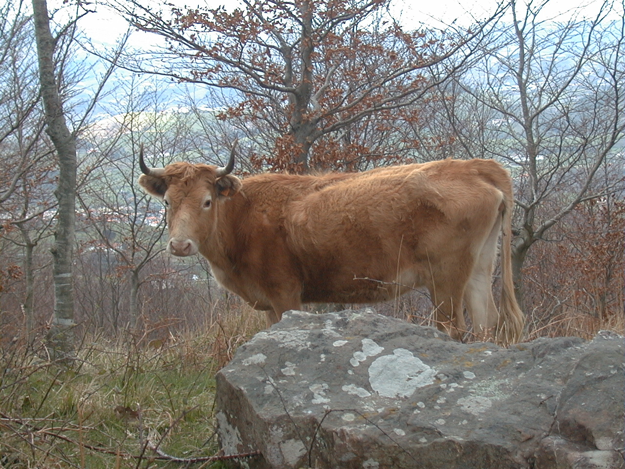 Betizu bat Adarra-Mandoegin